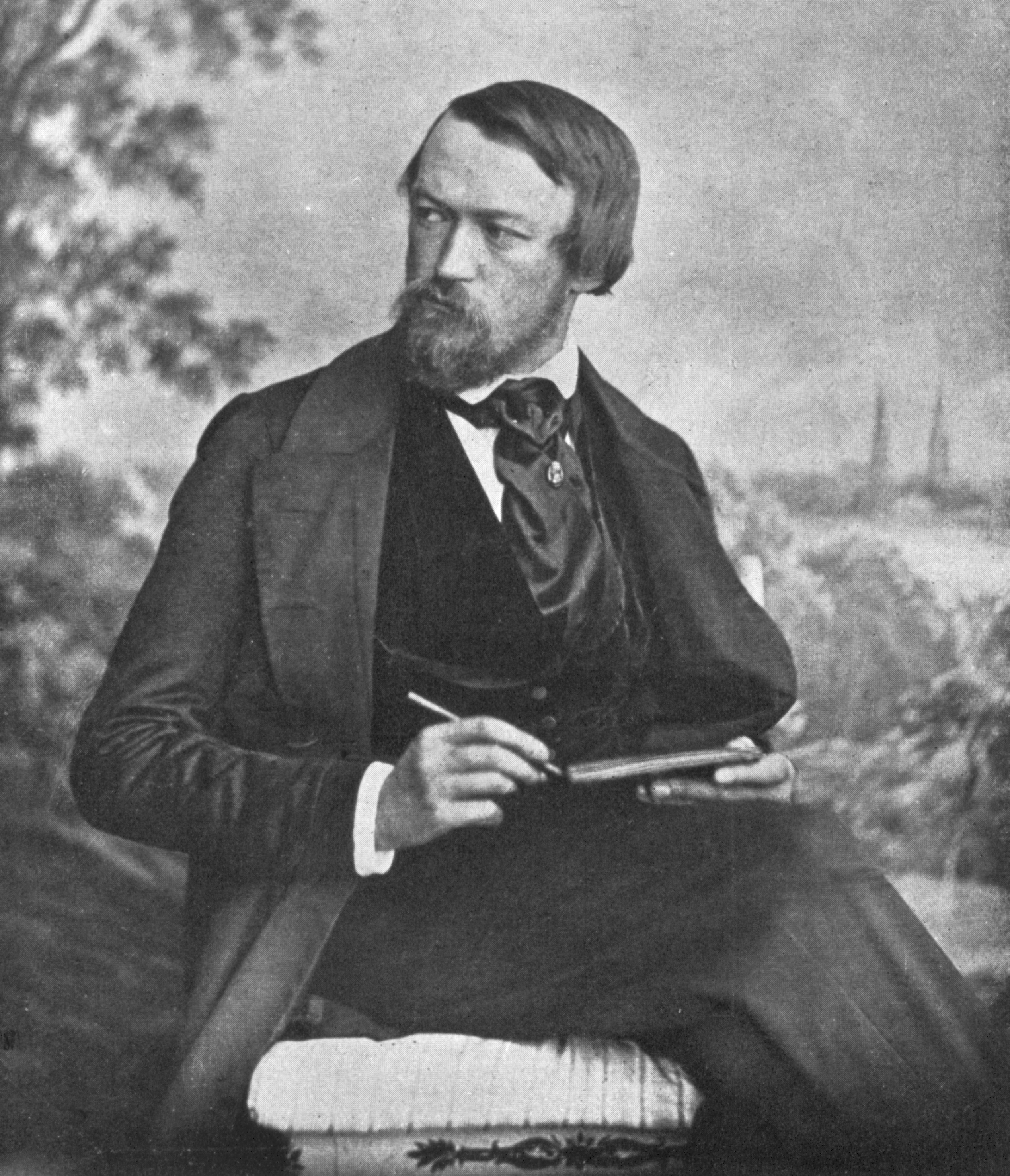 Der Maler Otto Specker (1807-1871)